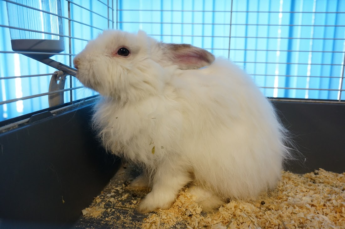 Белый пуховый кролик. Выставка кроликов в Тольятти.